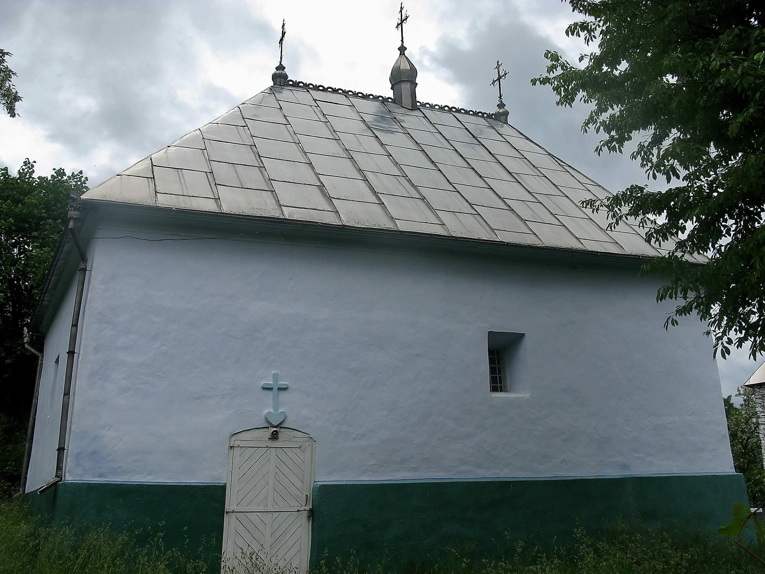 Комплекс споруд церкви та дзвіниці Різдва Пресвятої Богородиці: церква Різдва Пресвятої Богородиці та дзвіниця церкви Різдва Пресвятої Богородиці, с. Рухотин